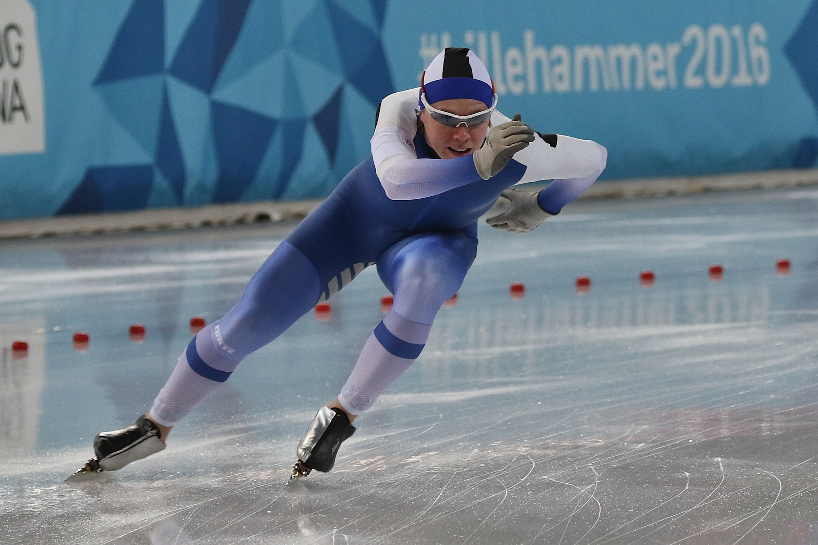 Lillehammer 2016 - Speed skating Men's 500m race 2 - Samuli Suomalainen